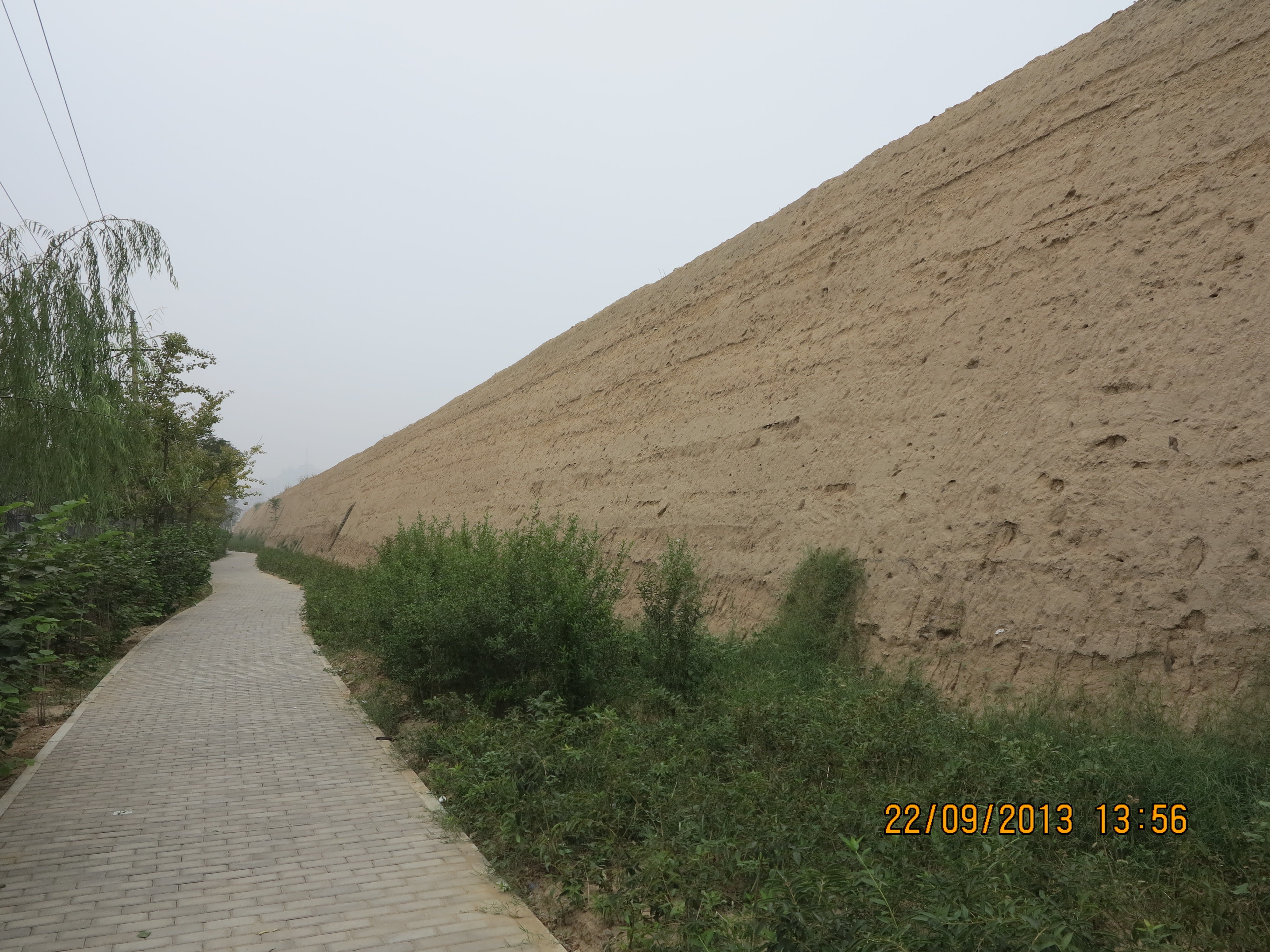 中文（中国大陆）: 郑州商城遗址